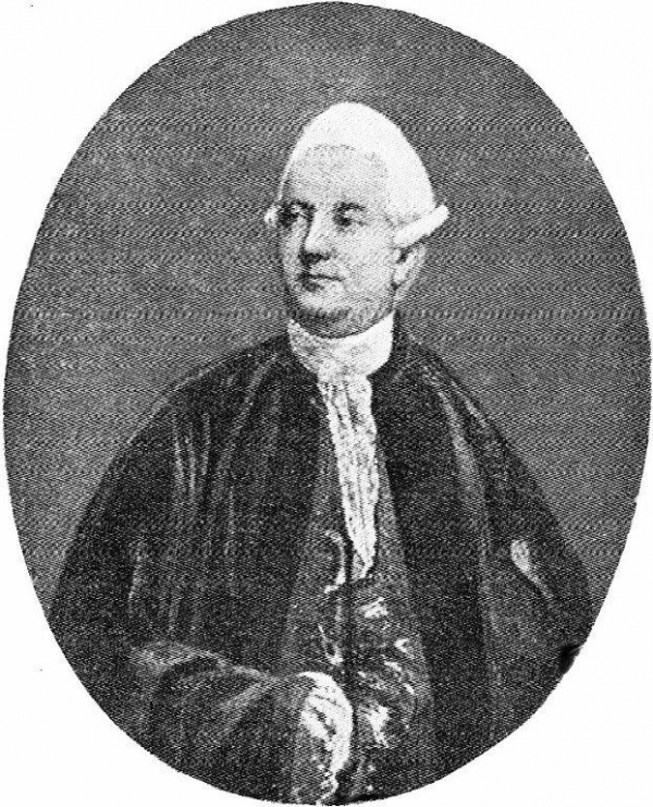 Piewter Willem (Pierre Guillaume) de Liedel de Well